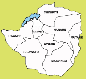 Mappa delle diocesi cattoliche dello Zimbabwe.